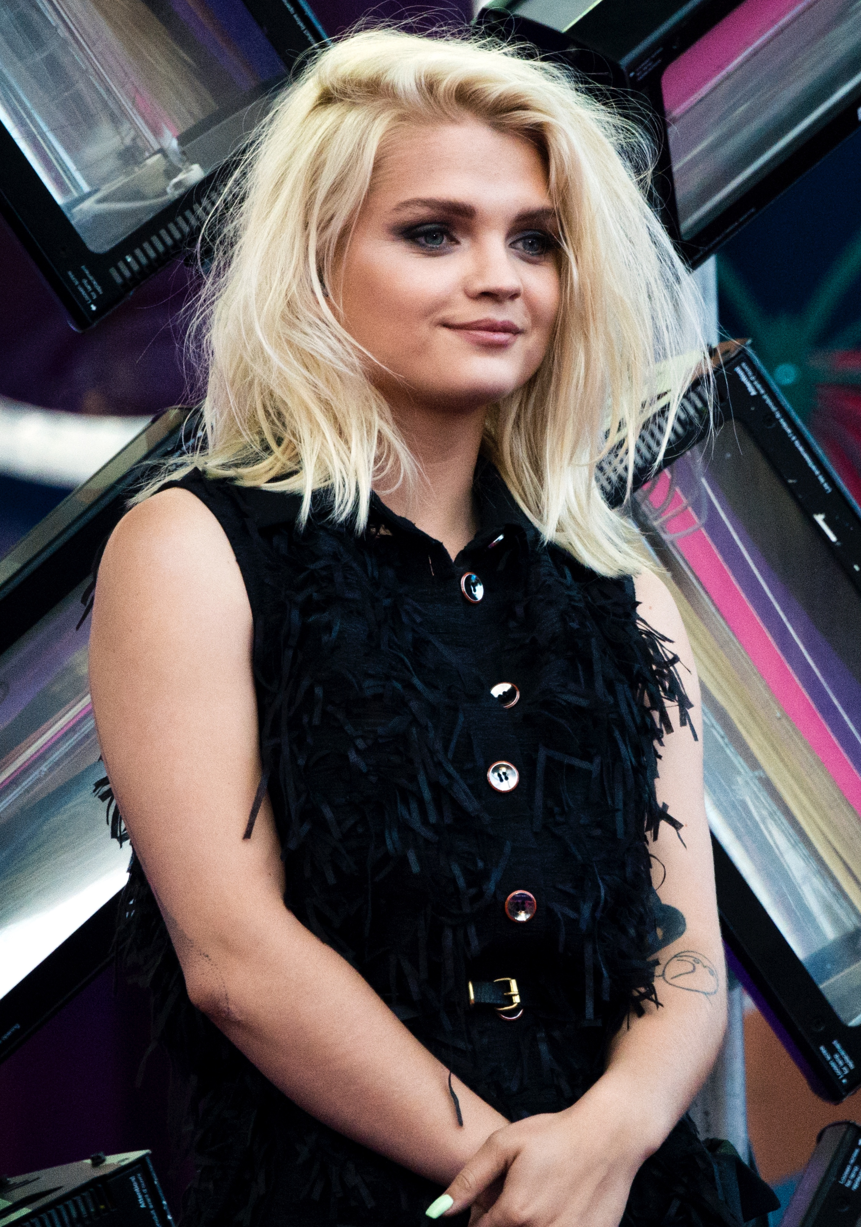 Margaret på Sommarkrysset, Gröna Lund